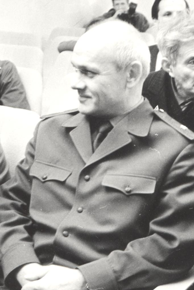 Vladimir Aleksandrovich Dzhanibekov, a Soviet cosmonaut who made five flights.